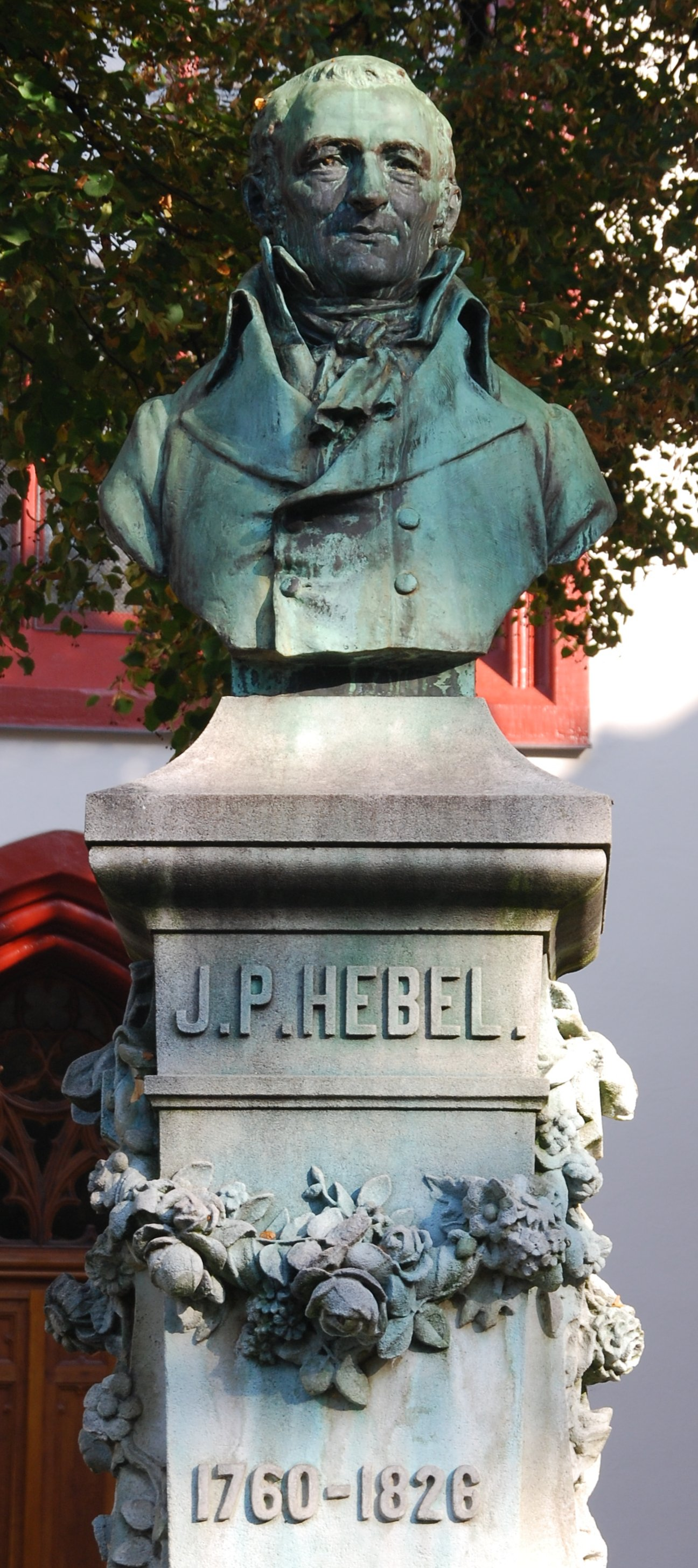 Hebeldenkmal in Basel vor der Peterskirche. Es handelt sich um einen Bronzeguss auf Marmorsockel von Max Leu aus dem Jahr 1897